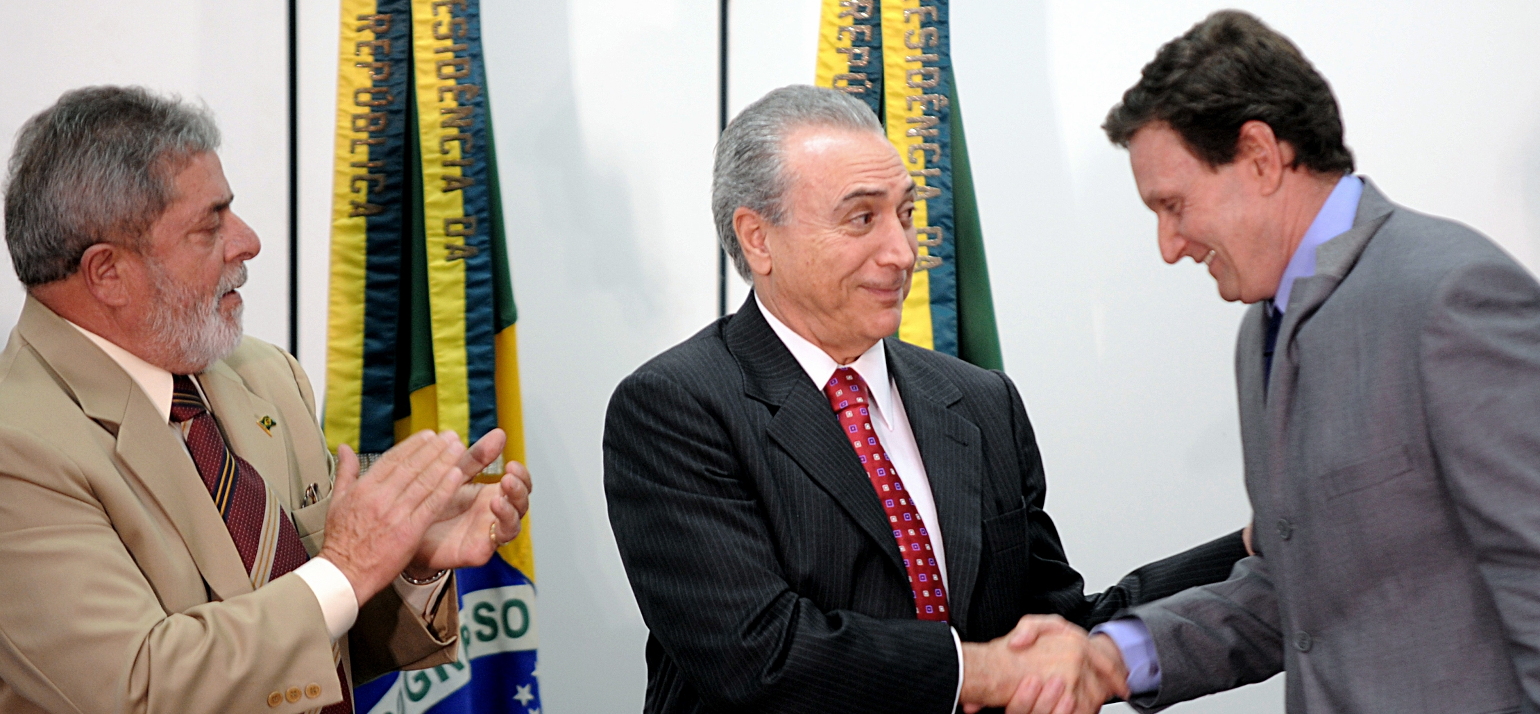 O presidente Lula, o presidente da Câmara, Michel Temer, e o senador Marcelo Crivella durante cerimônia de sanção do projeto de lei que institui o Dia Nacional da Marcha para Jesus.